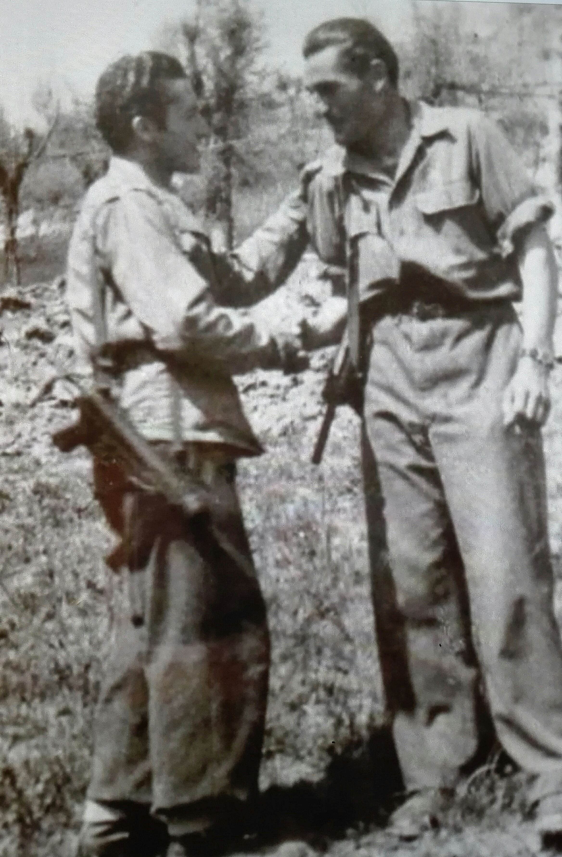 Il partigiano Agostino Melotti "Sergio" durante la seconda guerra mondiale Agostino Melotti, (nome da partigiano "Sergio") (Nonantola, 15 agosto 1919 – Modena, 2 febbraio 2010), è stato un partigiano e politico italiano, dirigente dell'ANPI di Modena. Durante la seconda guerra mondiale è arruolato nella Regia marina; successivamente al proclama dell'armistizio dell'8 settembre 1943 riesce a tornare nel modenese, dove diviene responsabile della zona, reclutando giovani per le formazioni partigiane. Dal 1944 al 1945 partecipa alla Brigata Walter Tabacchi in azioni clandestine e alla ricerca di aiuti per il sostentamento dei partigiani combattenti. Dal 22 febbraio 1945 è tenente della Brigata Zambelli, dove partecipò alla liberazione di Modena avvenuta il 22 aprile. Nel dopoguerra è stato dirigente nella federazione provinciale del Partito Comunista Italiano di Modena, mentre dal 1975 al 1985 è stato presidente della sezione comunale dell'Associazione Nazionale Partigiani d'Italia. Nel 1990 criticò aspramente Otello Montanari, a seguito della pubblicazione di un articolo sui delitti compiuti nel dopoguerra. Successivamente ha ricoperto la carica di dirigente del Comitato Direttivo Provinciale dell'ANPI dove sostenne, anche nel successivo dibattito interno, la posizione di chi era favorevole ad una riconciliazione nazionale.